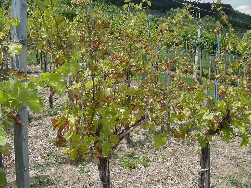 starke Chlorose auf Rebstöcken der Sorte Blauer Portugieser